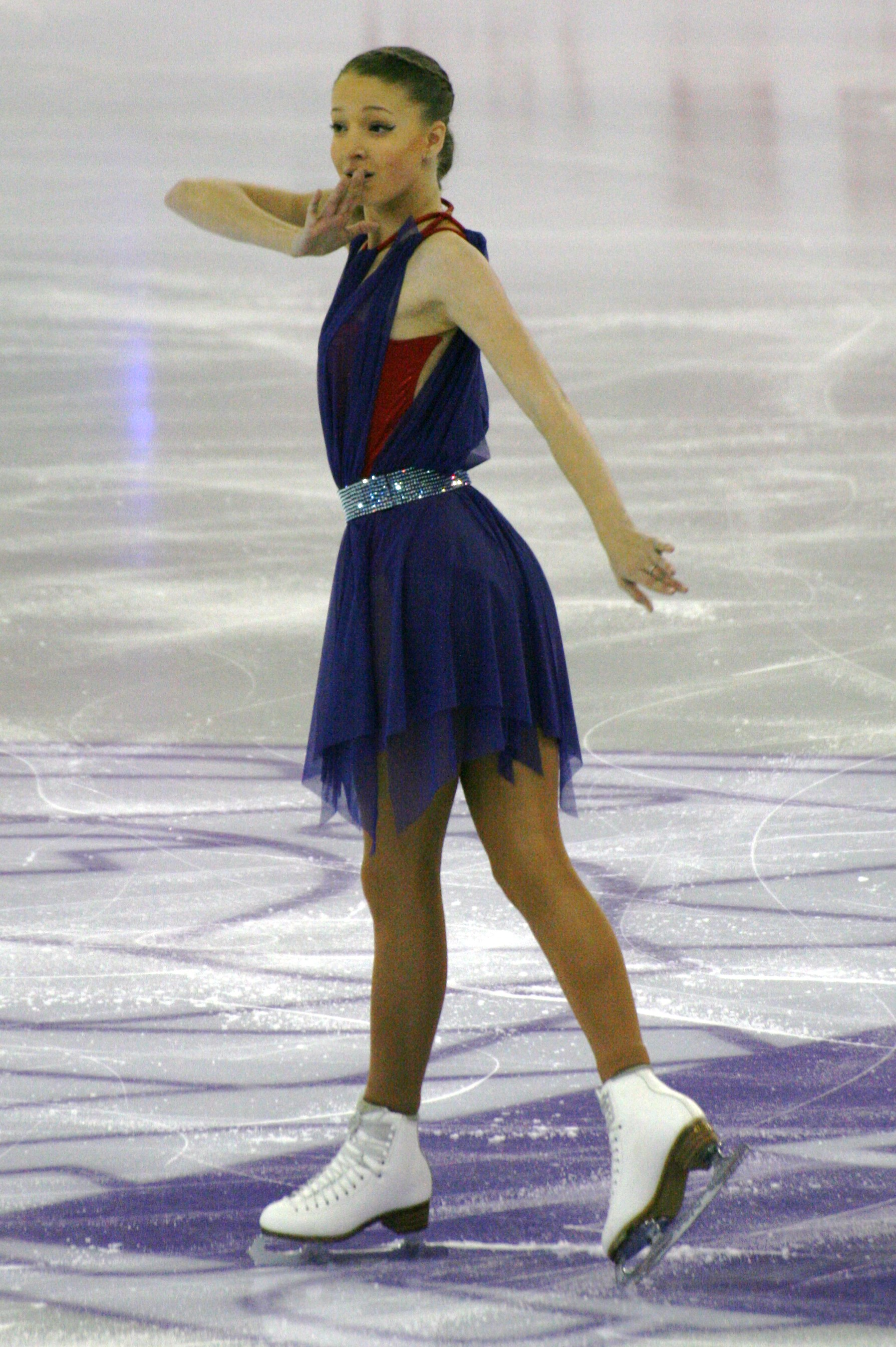 Мария Сотскова (Россия) на финале Гран-при по фигурному катанию среди юниоров 2015-2016.